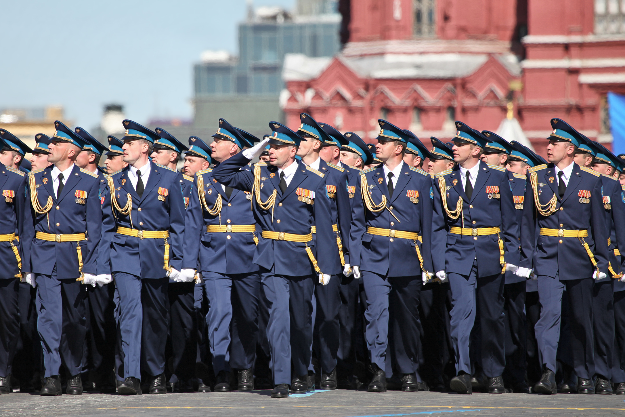 Военный учебно-научный центр ВВС Военно-воздушная академия (Air Focre Academy)